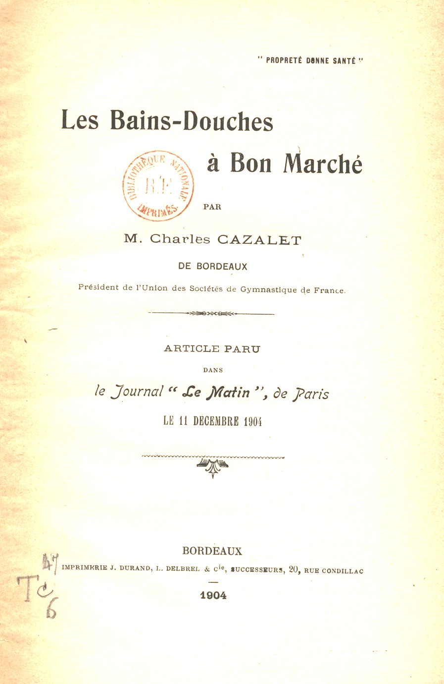 Charles Cazalet, Les Bains-Douches à bon marché, Bordeaux, 1904.